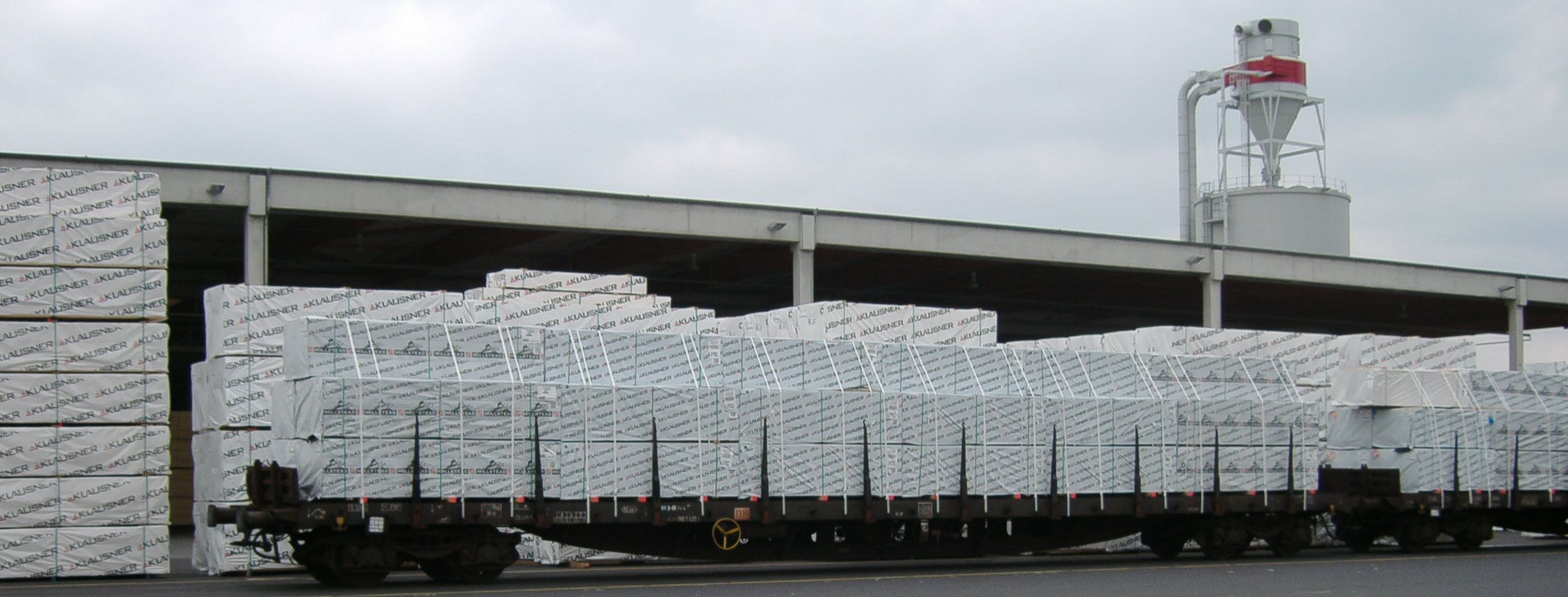 Überlanger Flachwagen der Regelbauart, Gattung Rs-u 679 (LüP 22,24 m / Ladelänge 20,7 m). Aufgenommen am Sägewerk Kodersdorf.